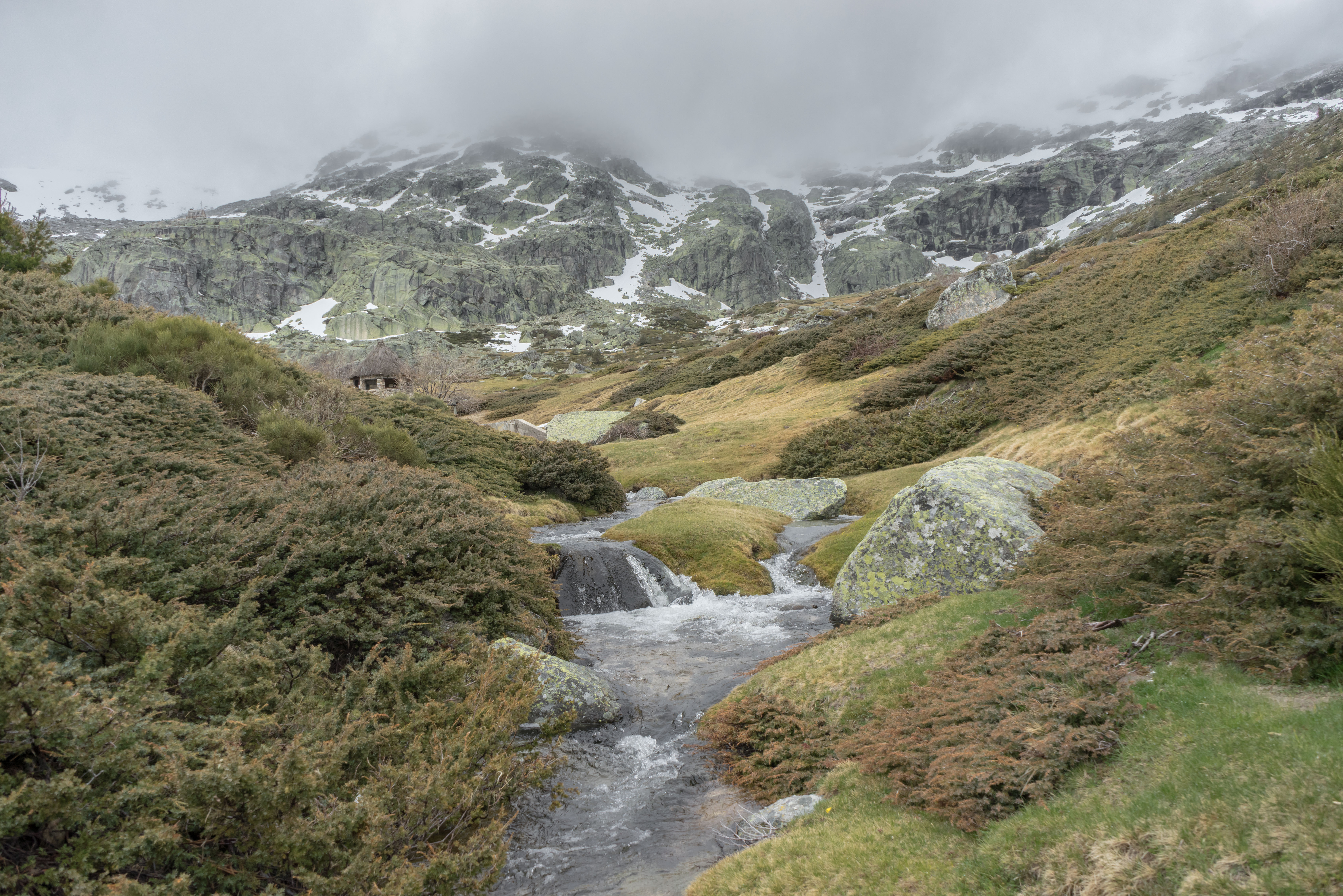 Peñalara (Madrid)